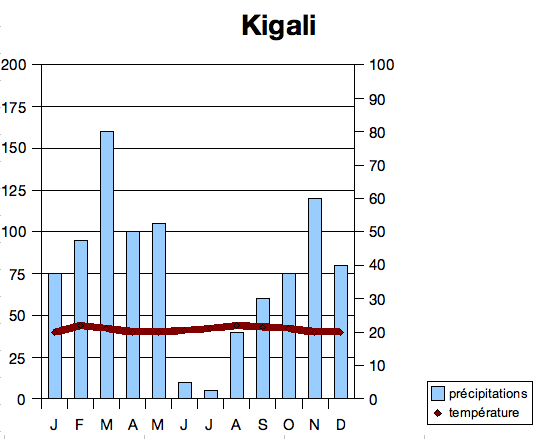 Climate diagram of Kigali, Rwanda